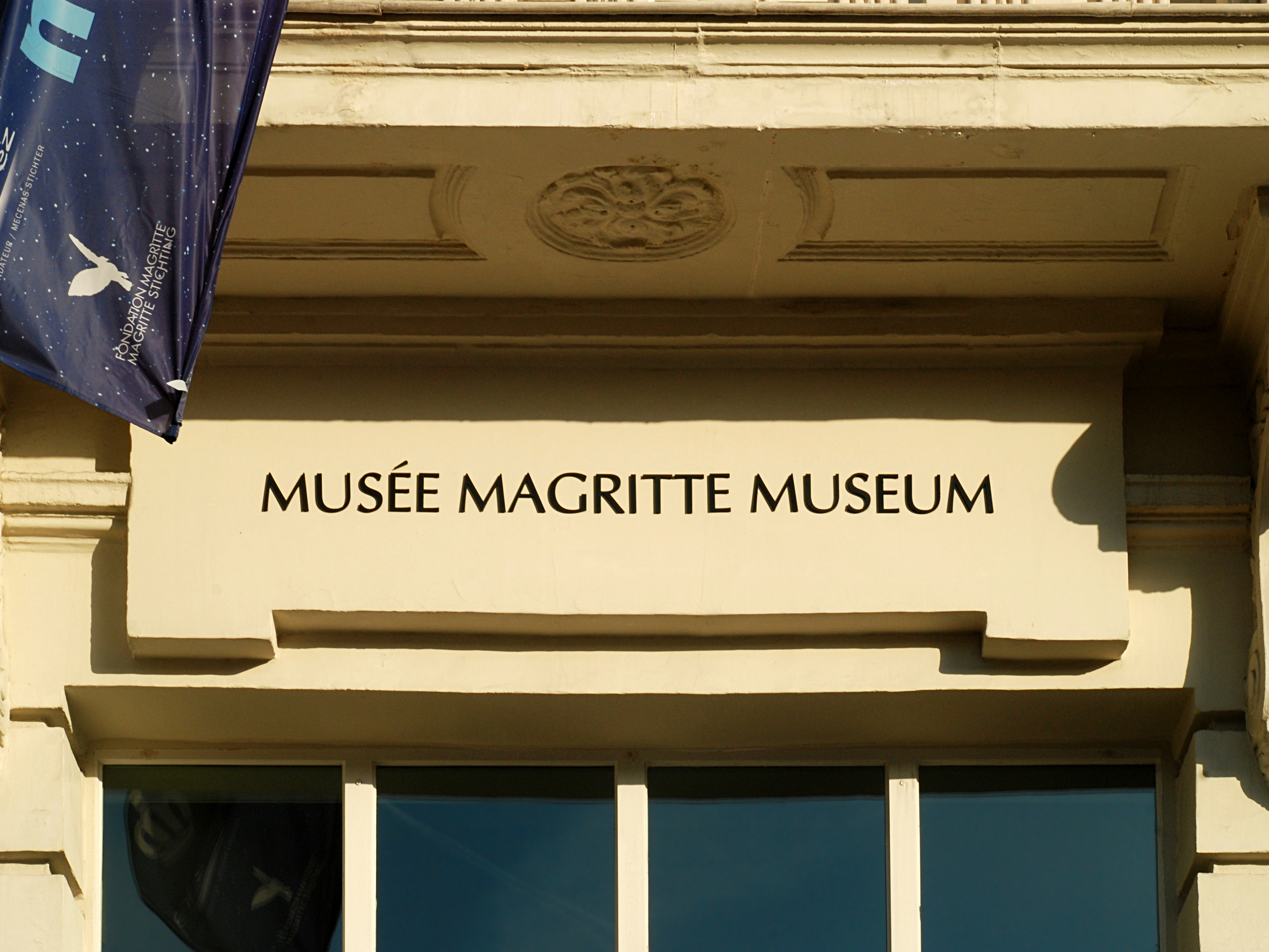 Belgique - Bruxelles - Place Royale - Hôtel du Lotto